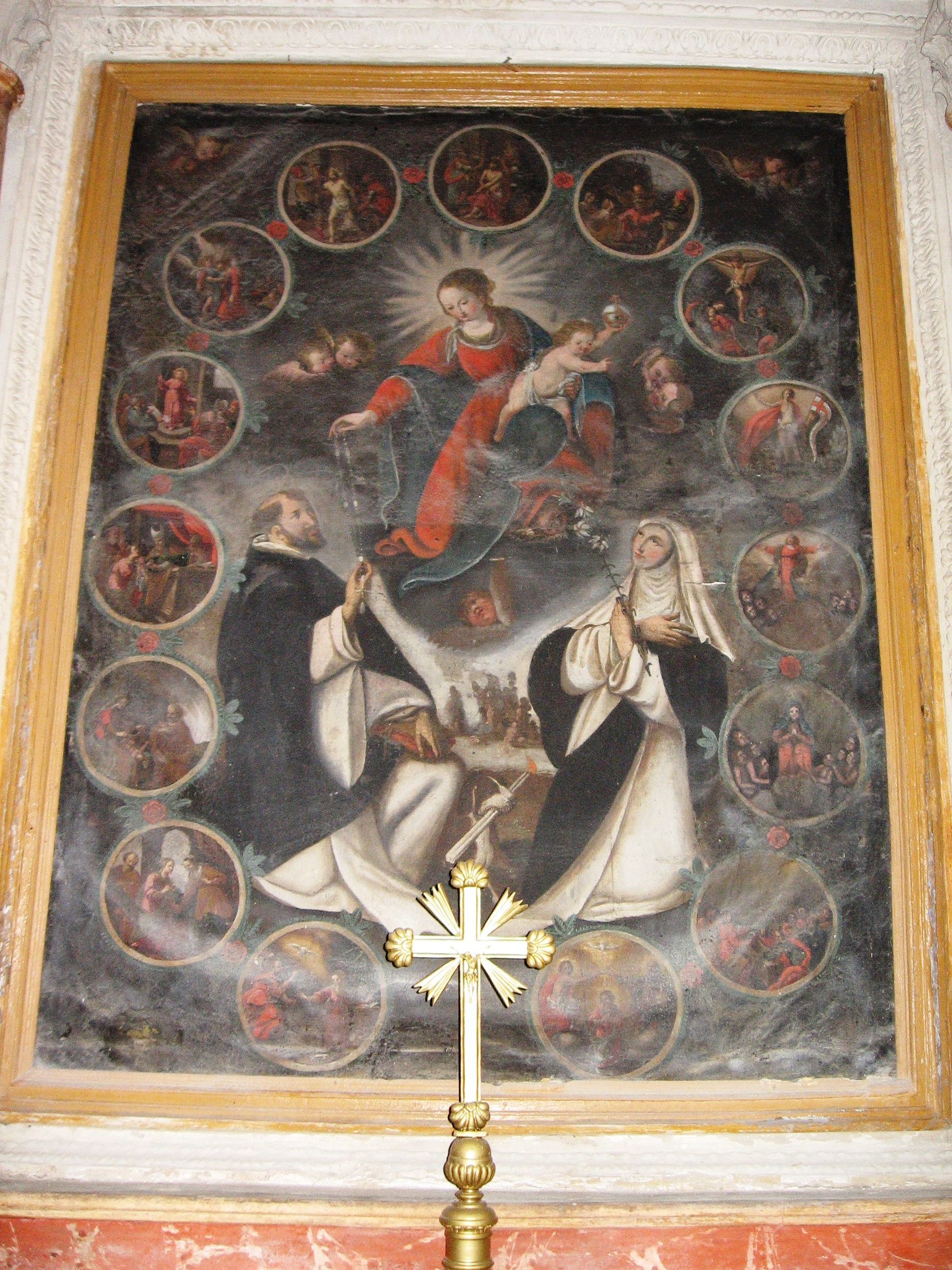 Pezzolo Valle Uzzone. Gorrino. Parrocchiale di San Pietro Apostolo. Cappella di ds. La Madonna del Rosario con i santi Domenico di Guzman e Santa Caterina da Siena. Secolo XVII